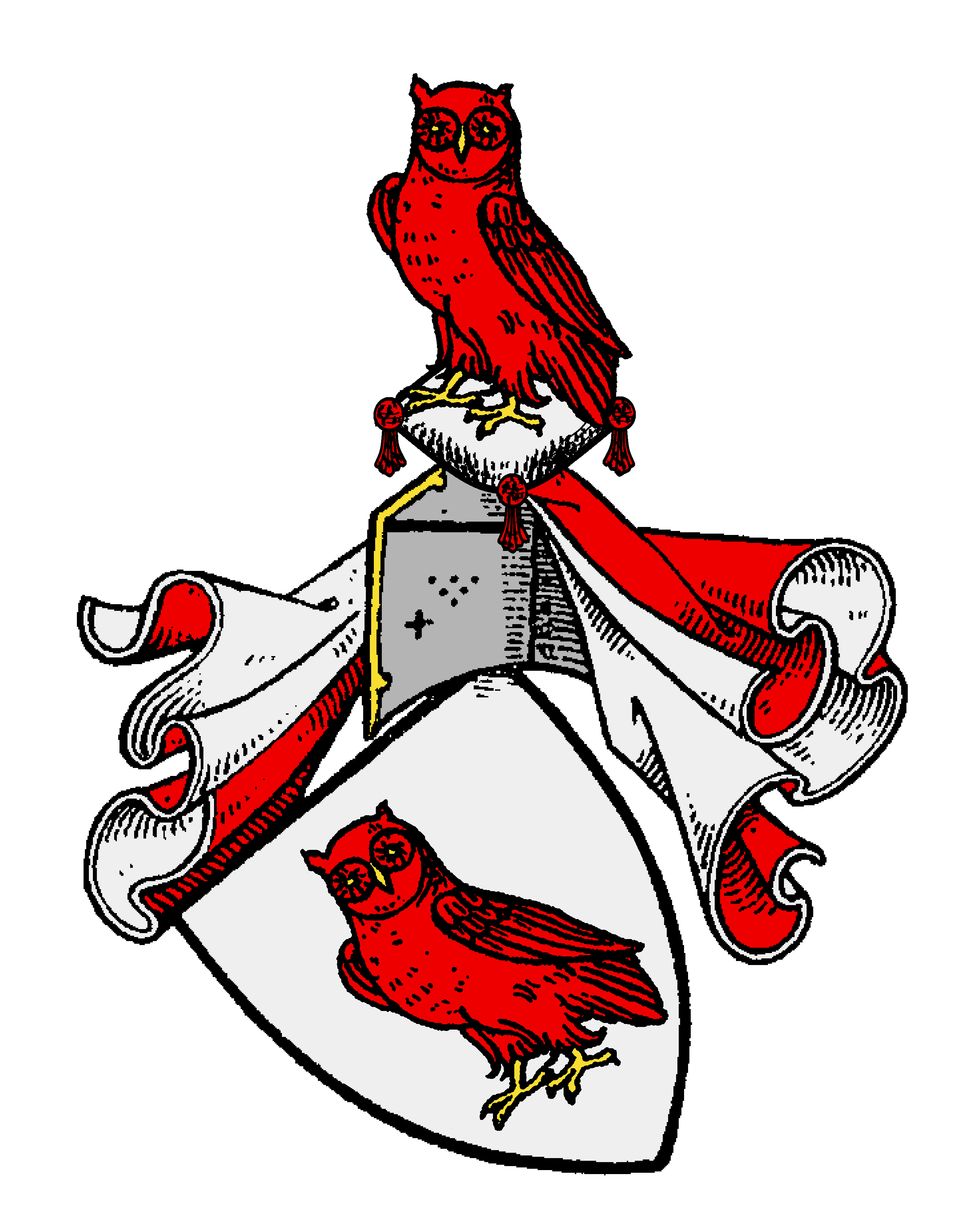 Wappen der Herwarth, altes regimentsfähiges Adelsgeschlecht der Reichsstadt Augsburg